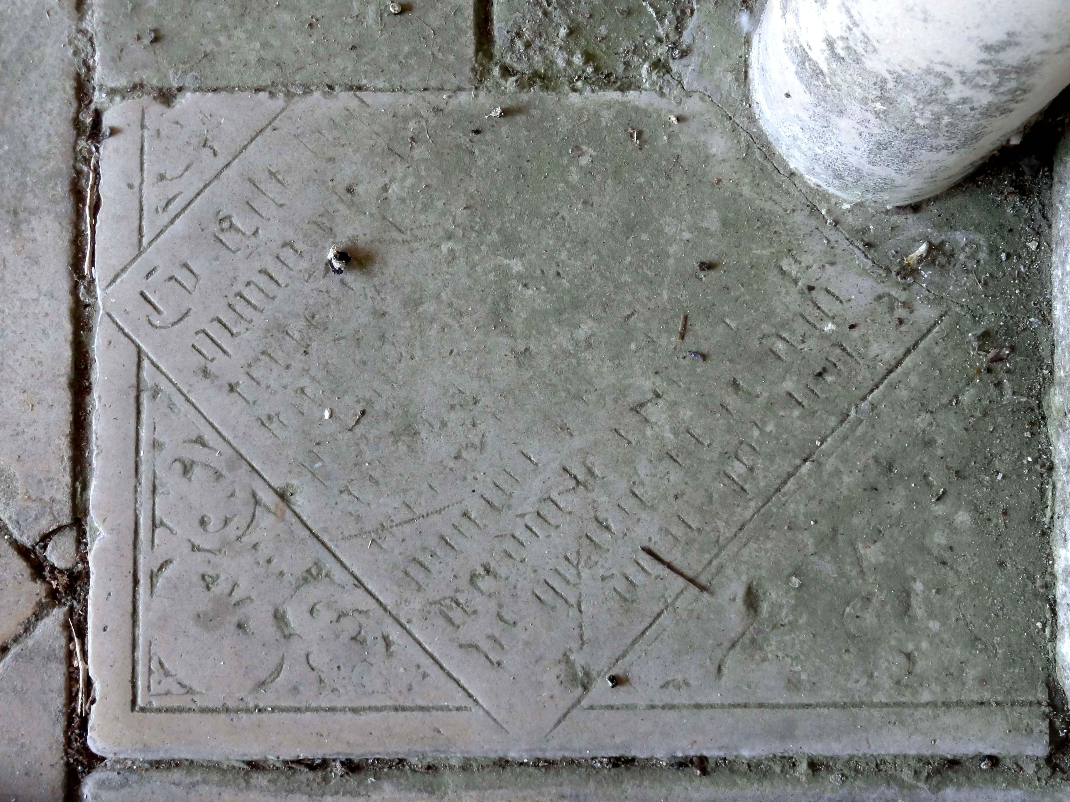 Mobilier de l'église (voir titre).